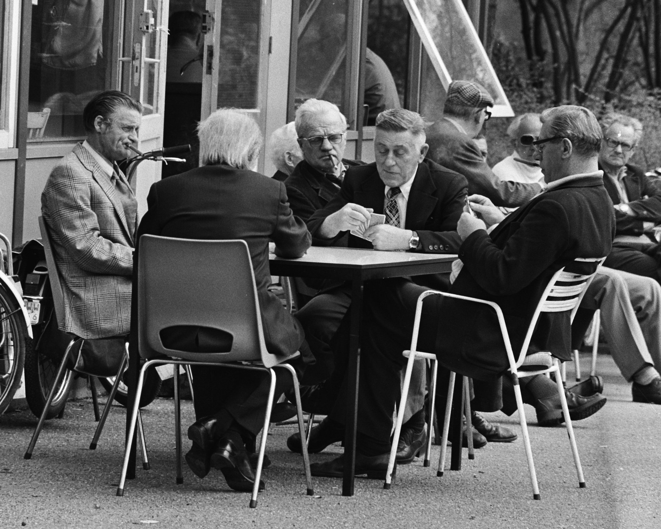 Collectie / Archief : Fotocollectie Anefo Reportage / Serie : [ onbekend ] Beschrijving : Mooi weer in Amsterdam; klaverjassen in het Vondelpark Datum : 22 april 1975 Locatie : Amsterdam, Noord-Holland Fotograaf : Bogaerts, Rob / Anefo Auteursrechthebbende : Nationaal Archief Materiaalsoort : Negatief (zwart/wit) Nummer archiefinventaris : bekijk toegang 2.24.01.05 Bestanddeelnummer : 927-8854